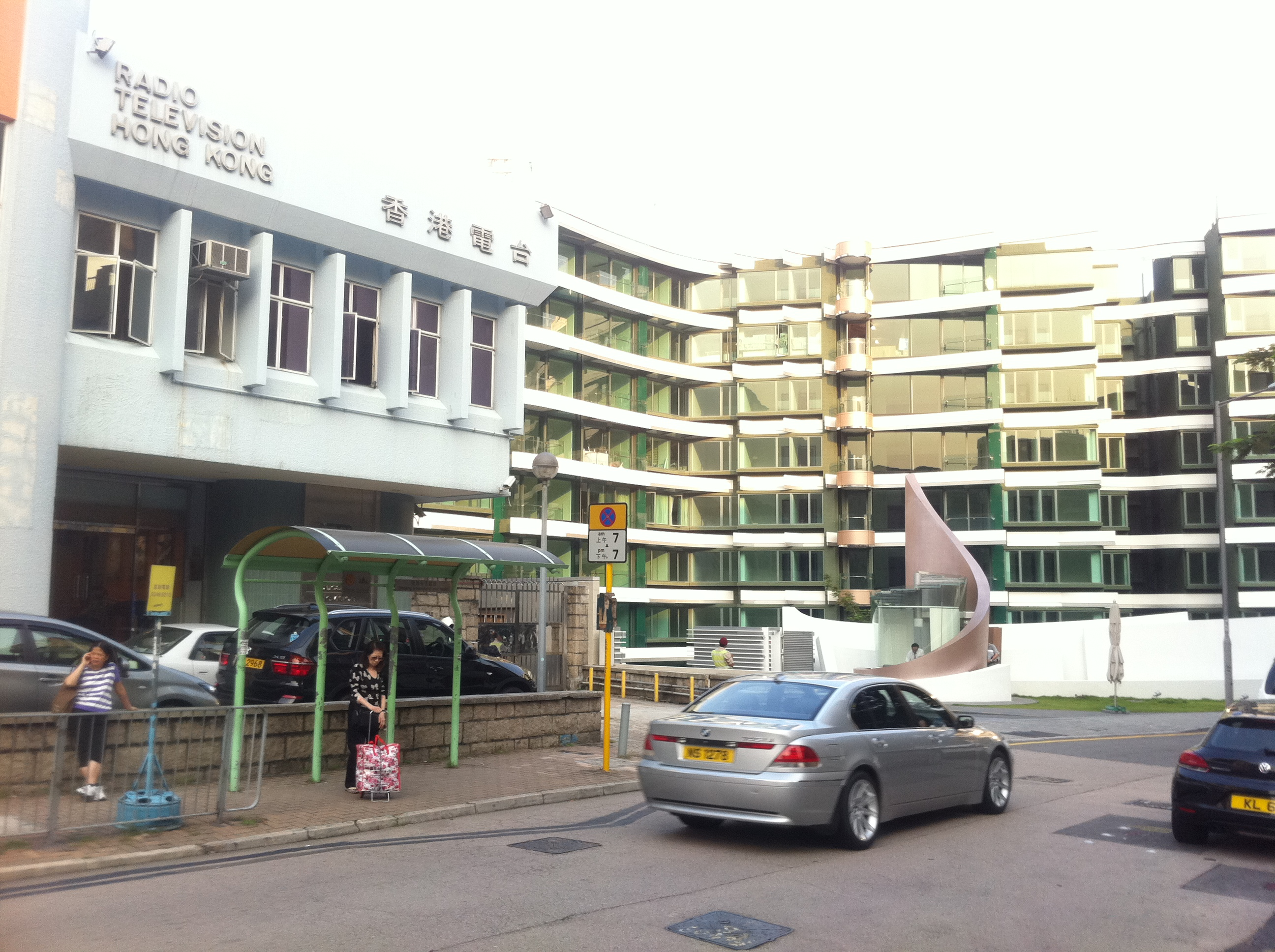 中文（香港）: 香港九龍九龍塘zh:廣播道81號 - 尚御